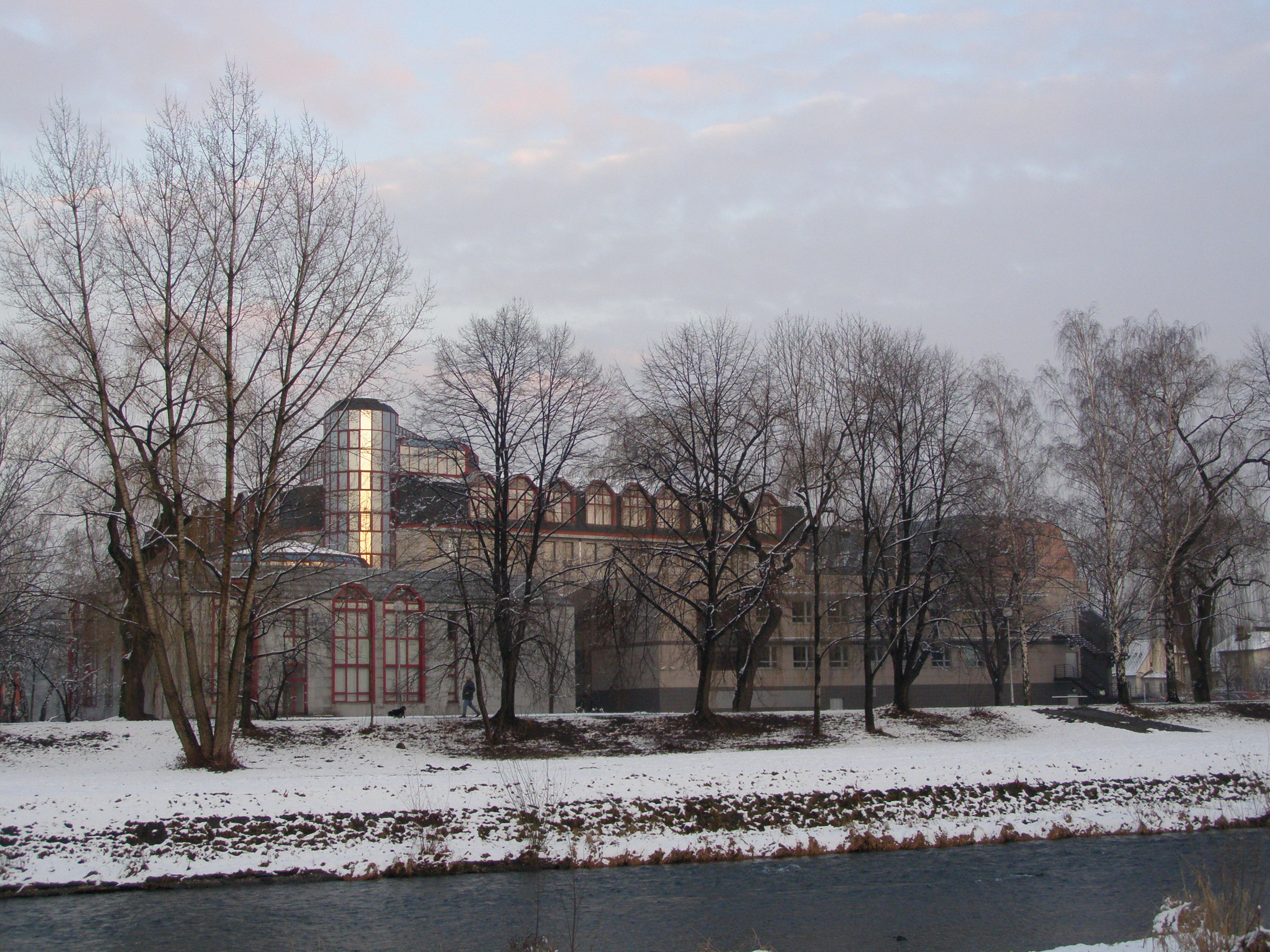 Frýdek, Okresní soud, břeh řeky Ostravice